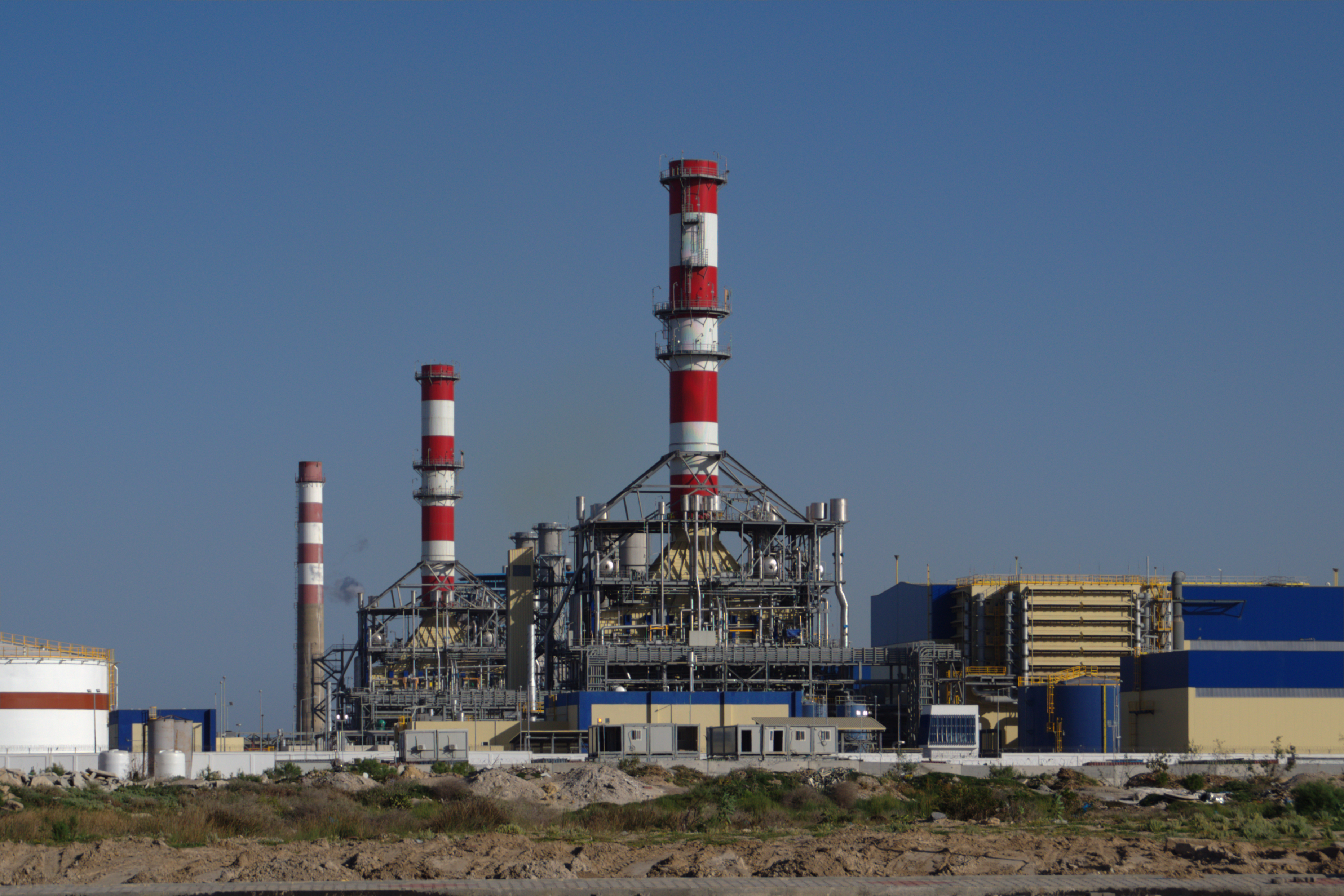 Images prise depuis la Foire de Sousse